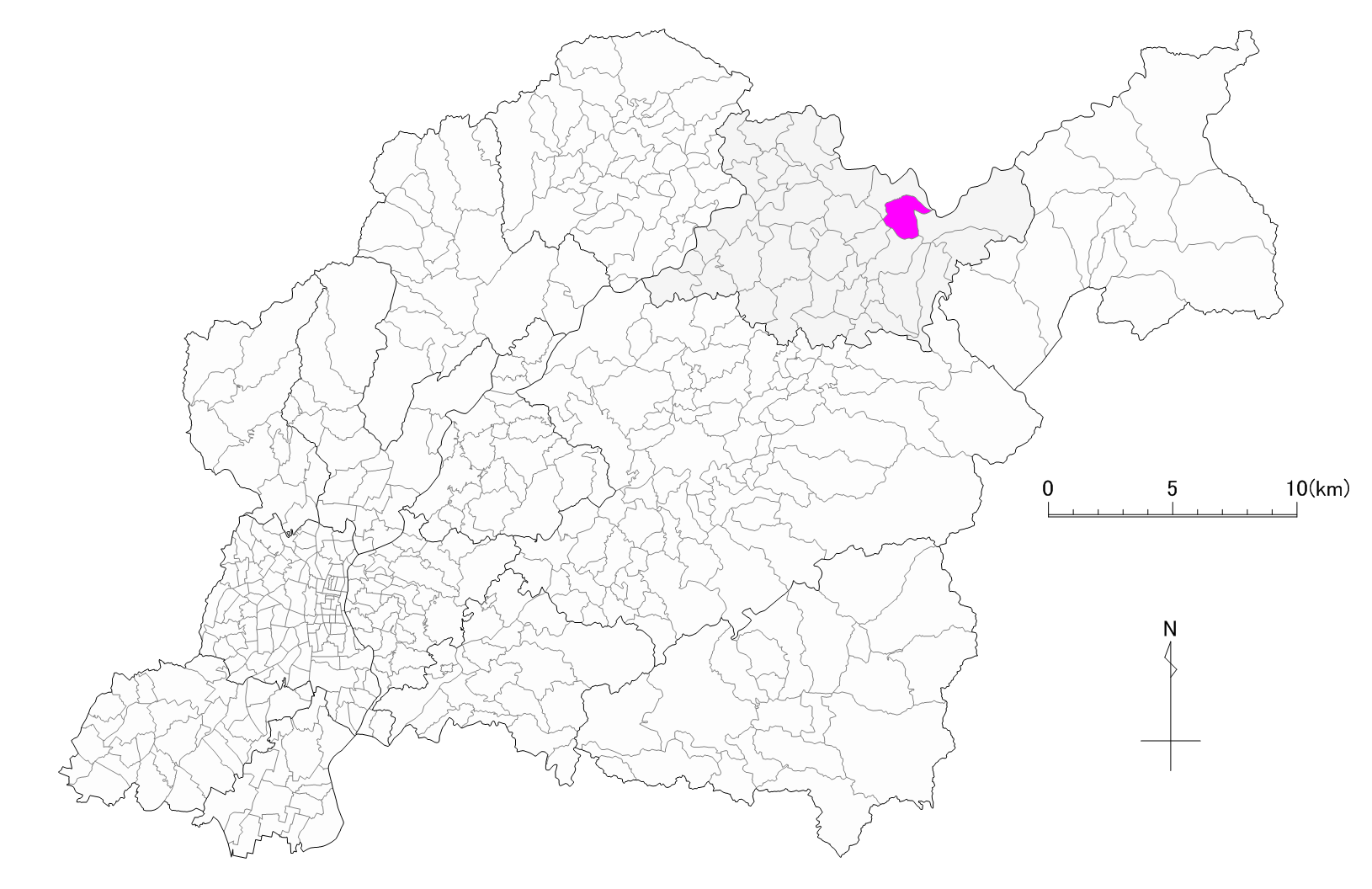 豊田市小滝野町位置図